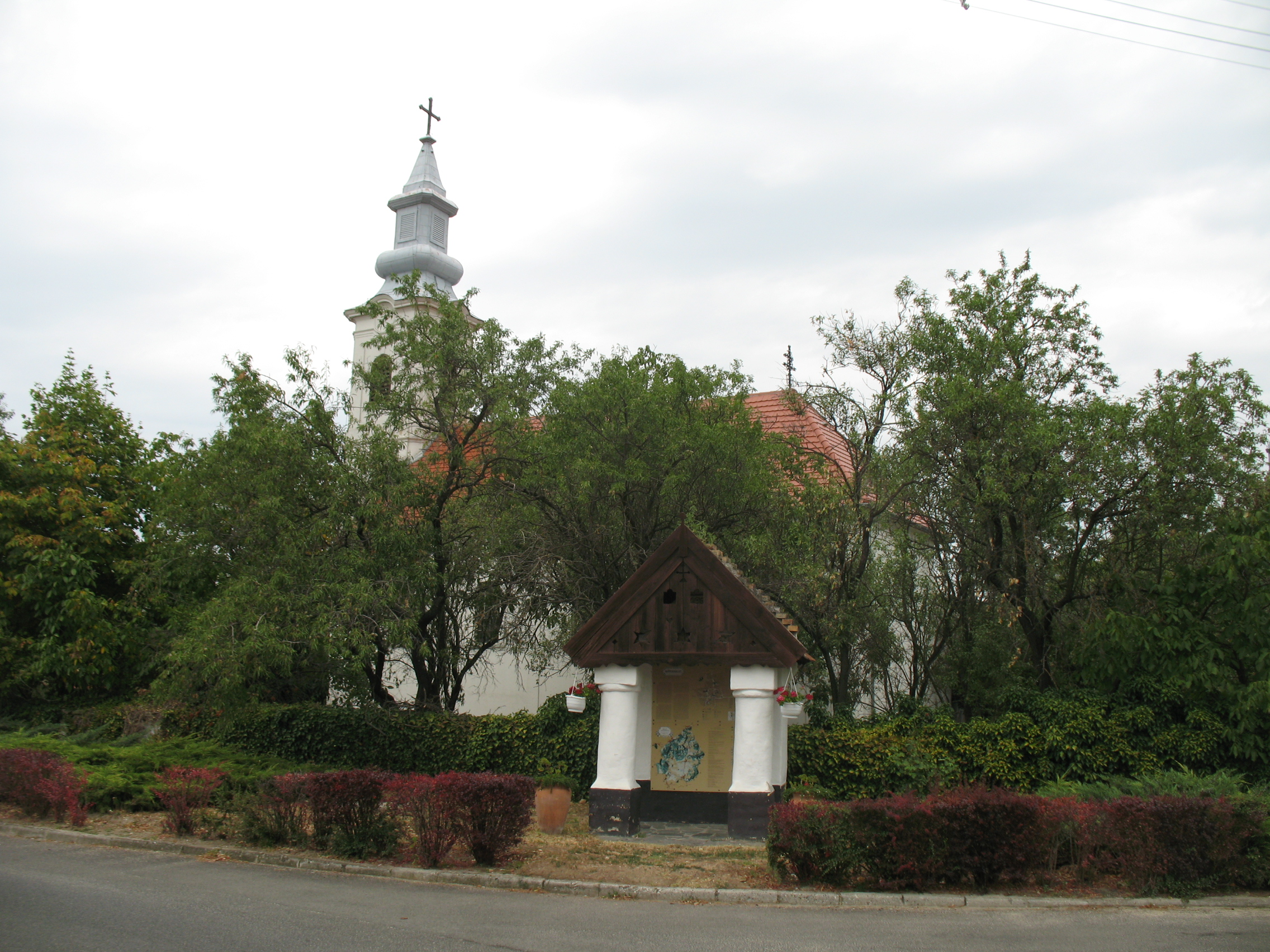 Köveskál